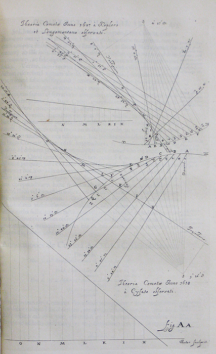 Tavola AA dell'opera Cometographia di Johannes Hevelius